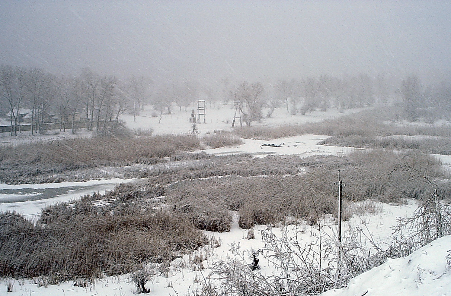 Остров зимой